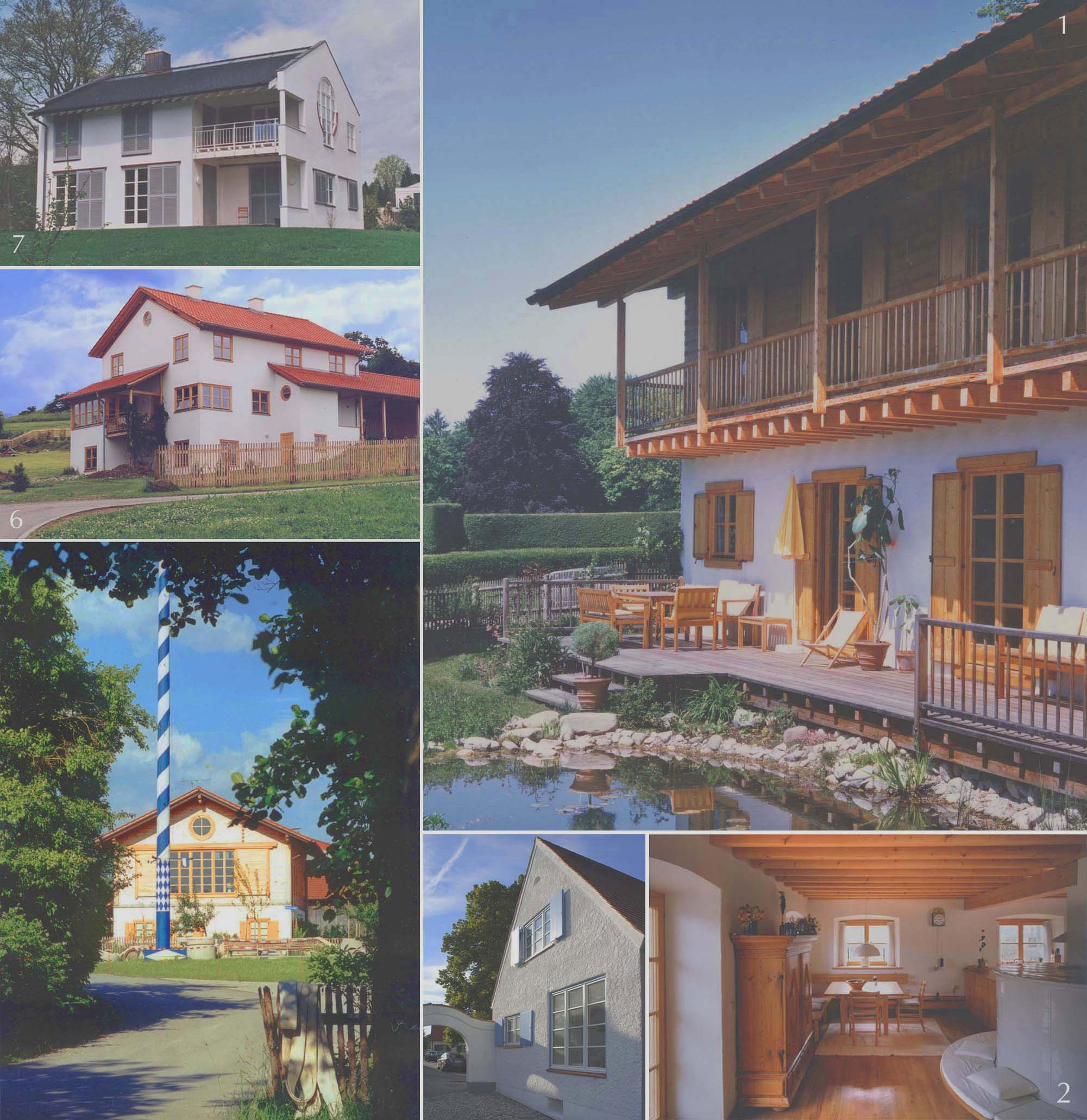 Projekte Folkerts Architekten in Feldafing, Neufahrn, Thüringen, Weilheim